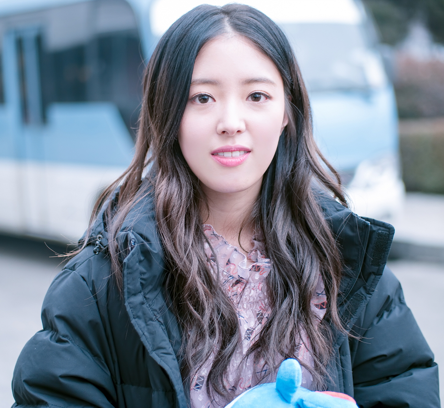 170204 KBS 해피투게더 퇴근 이세영 직찍 BY Junie